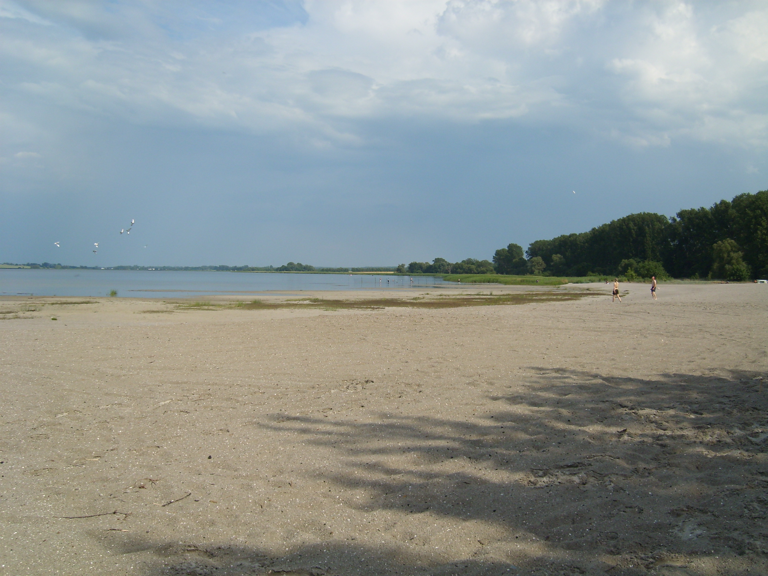 Das Strandbad Eldena im Sommer 2008 (Blick Richtung Ostsüdost). Der Strandbereich inklusive des dahinterliegenden Grünstreifens wurde im September und Oktober 2008 planiert; ein Deich ist im Entstehen.